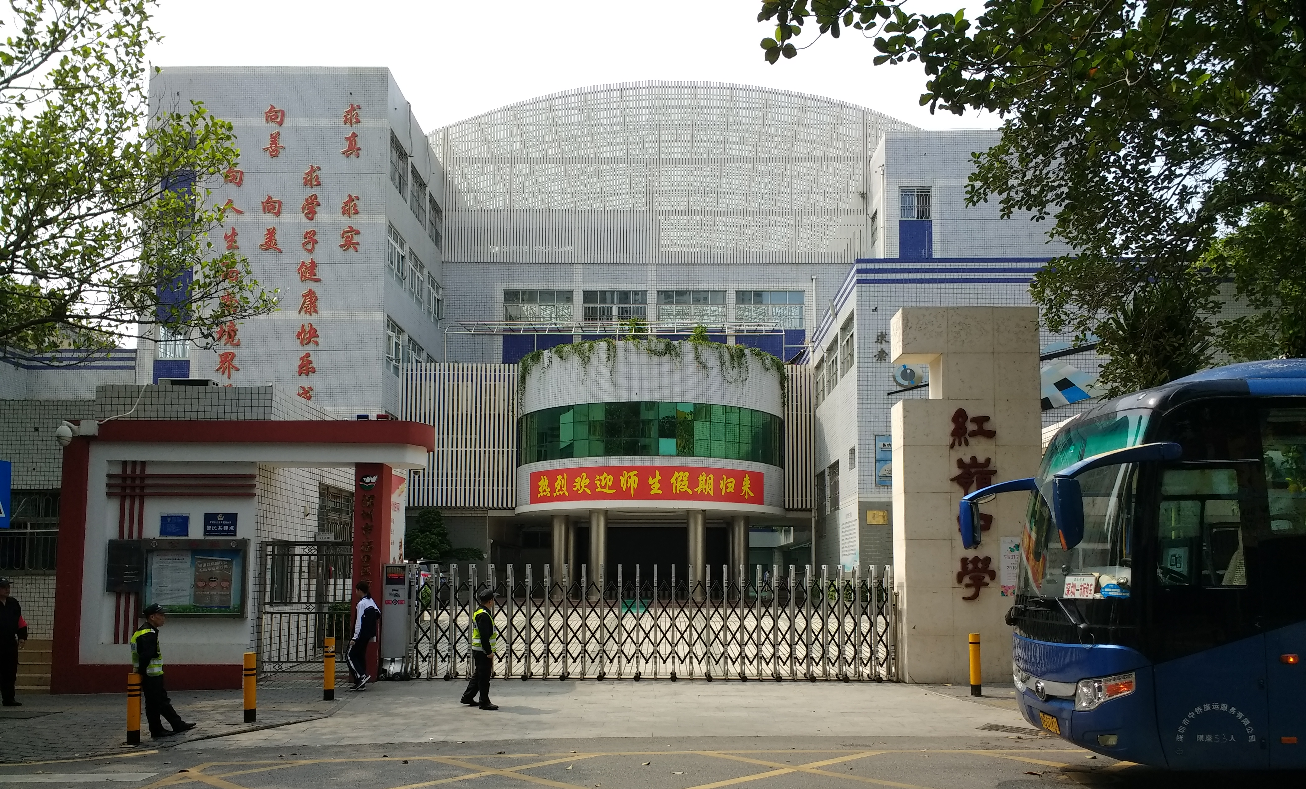 红岭中学，在深圳市福田区红岭路